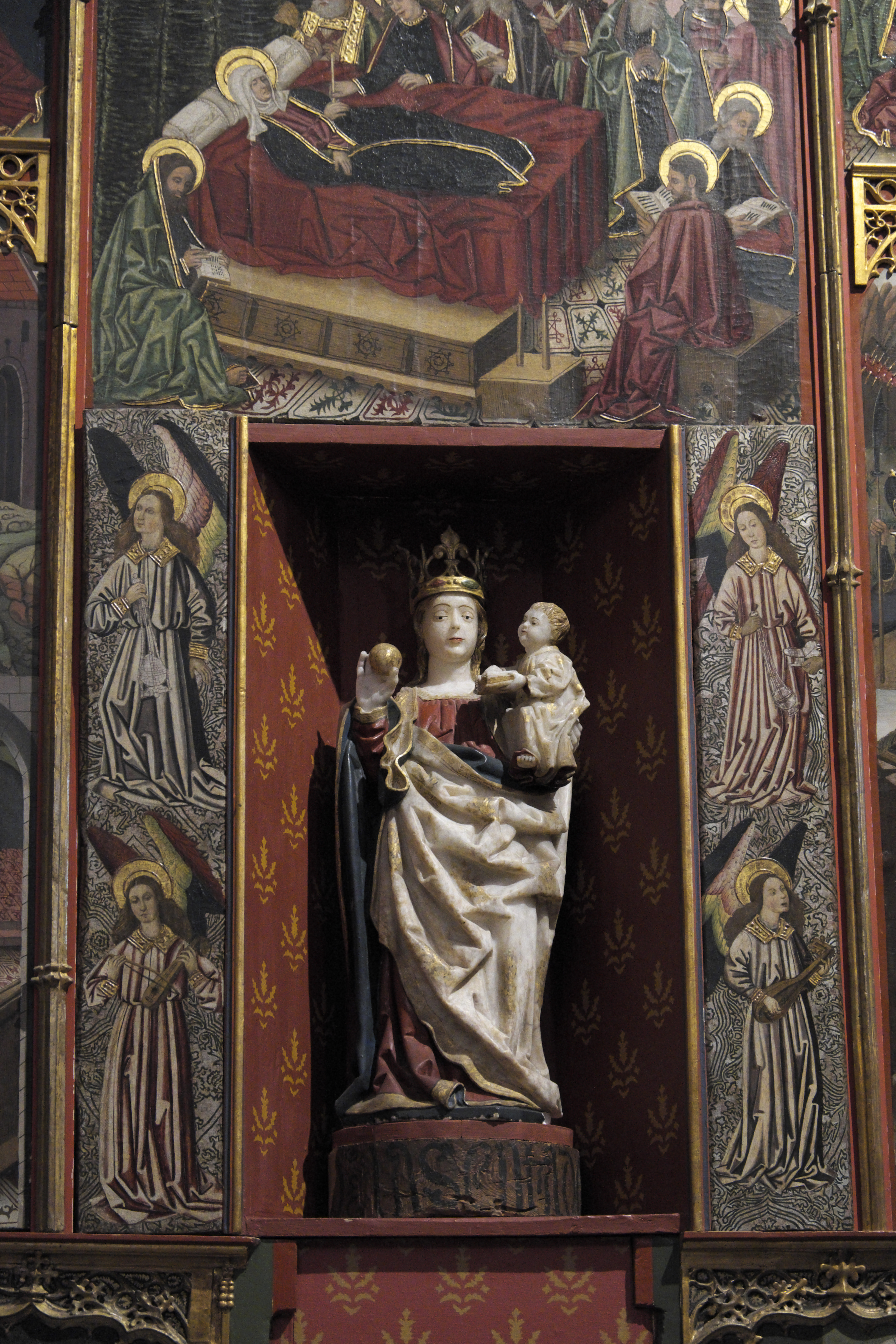 Pfarrkirche und ehemalige Klosterkirche Santa María in Santa Cruz de la Serós in der Provinz Huesca (Aragón/Spanien), Retabel von 1490 mit Alabasterfigur Madonna mit Kind aus dem 15. Jahrhundert